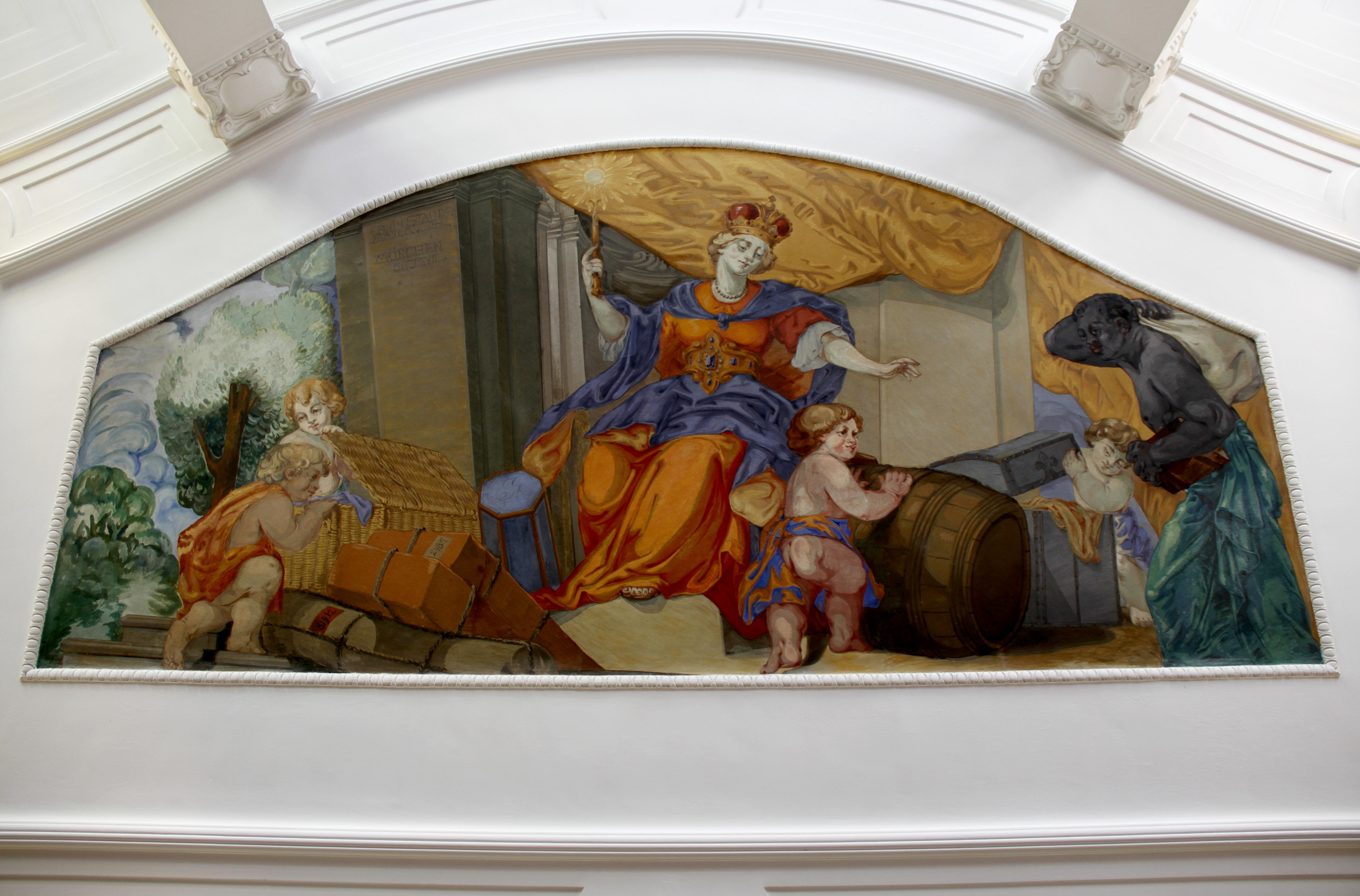 Deckengemälde im Vestibül des Hauptzollamts München, 1912. Als Maler wird in zeitgenössischen Baubschreibungen ein anderweitig nicht fassbarer Kunstmaler Staudenmayer aus München genannt. Das Gemälde zeigt die Patrona Bavariae als Herrscherin über Handel und Gewerbe, symbolisiert durch Putten, die Grundlage des Zolls. Der "Mohr" rechts im Bild stellt die exotischen Waren dar, die über das Hauptzollamt eingeführt werden.